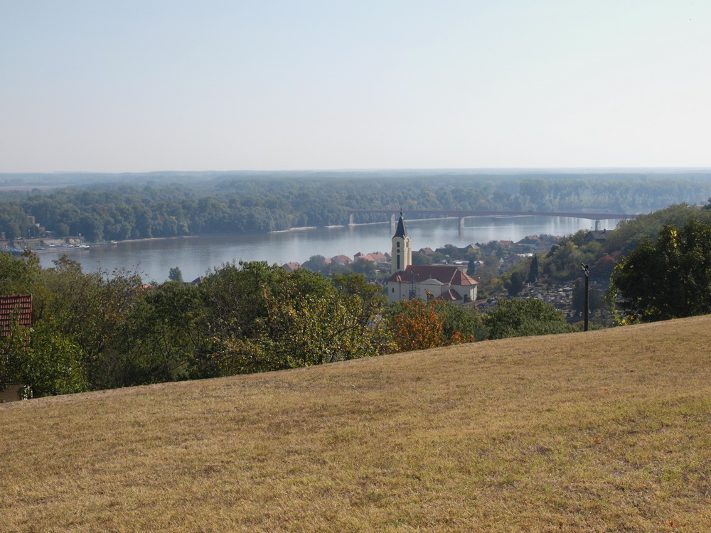 Naselje Batina (pogled sa spomenika).